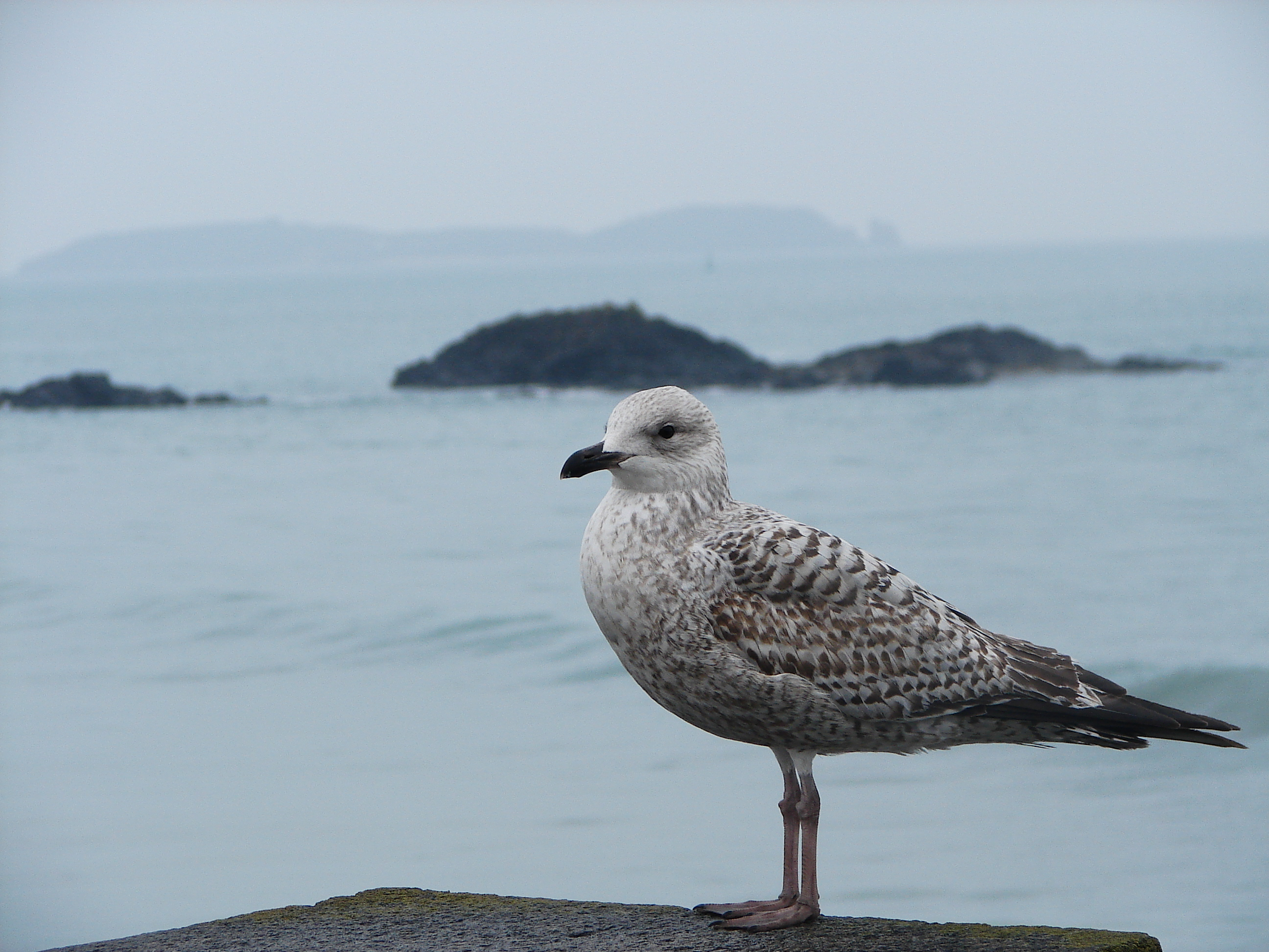 Lieu : Saint Malo (Bretagne / France) Jeune Goéland argenté (Herring Gull)